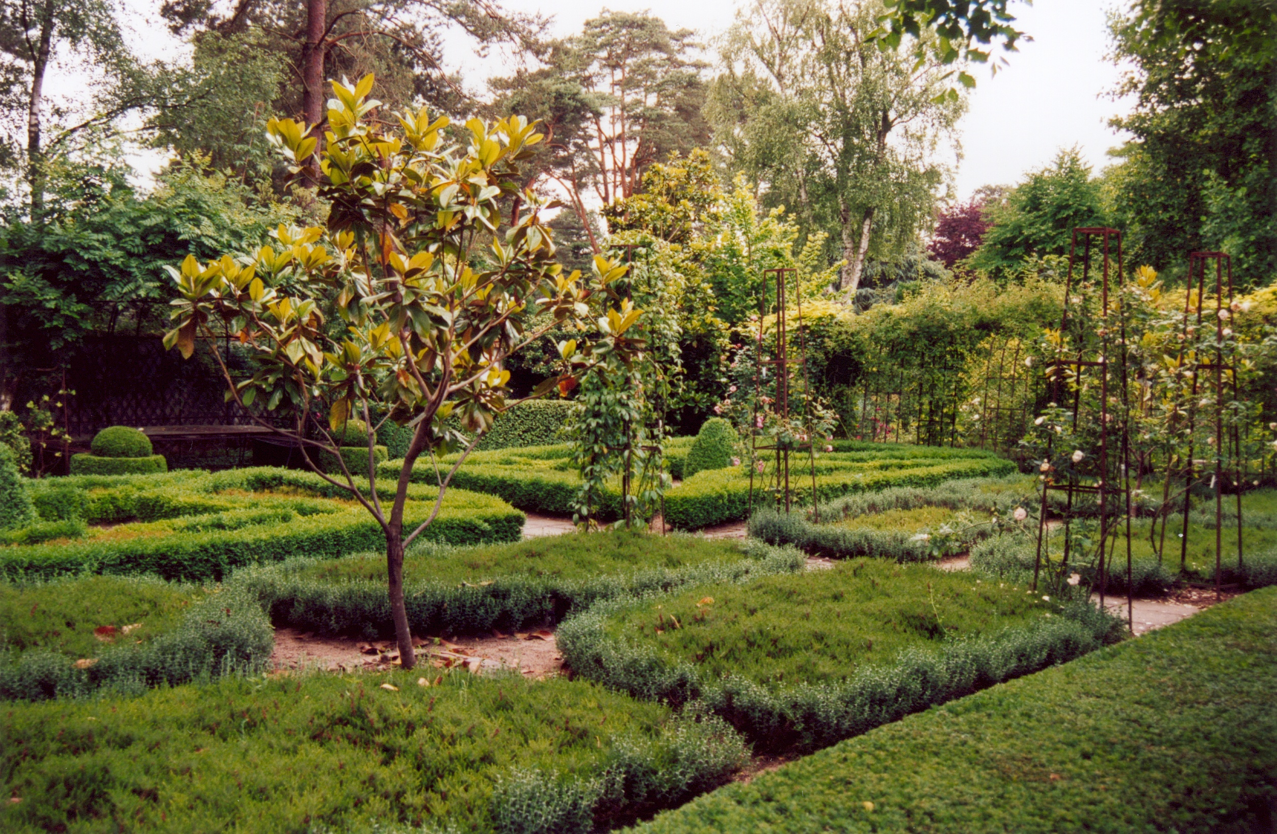 France Loiret Ingrannes Arboretum des Grandes Bruyères Photographie prise par GIRAUD Patrick